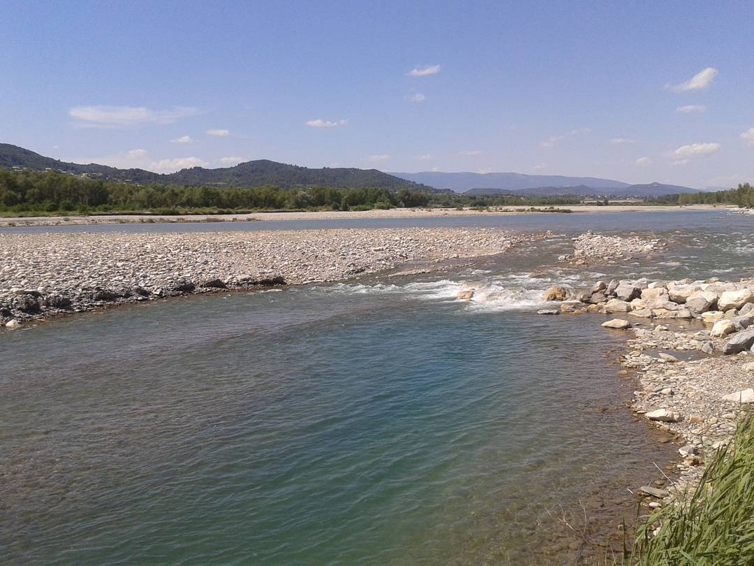 La Durance depuis le lac des Buissonnades à Oraison